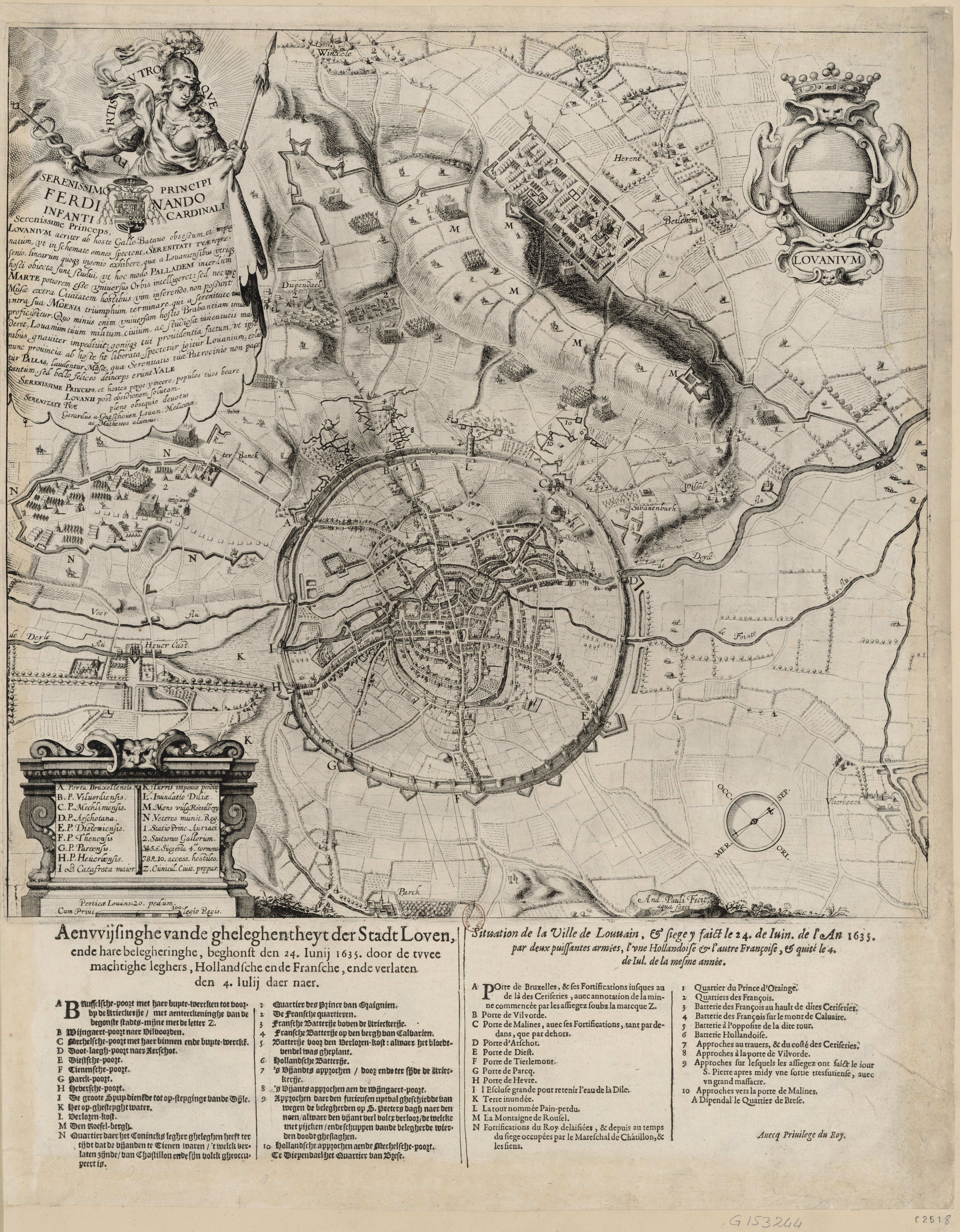 Situation de la ville de Louvain et siége y faict, le 24 de juin de l'an 1635, par deux puissantes armées, l'une Hollandoise et l'autre Françoise, et quité le 4 de jul. de la mesme année. Bibliothèque nationale de France, département Estampes et photographie, RESERVE QB-201 (29)-FOL. Appartient à : Recueil. Collection Michel Hennin. Estampes relatives à l'Histoire de France. Tome 29, Pièces 2507-2592, période : 1635.